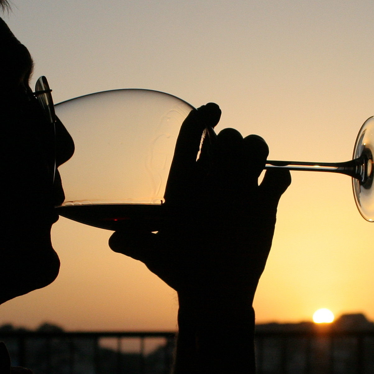 Una copa de vino al atardecer